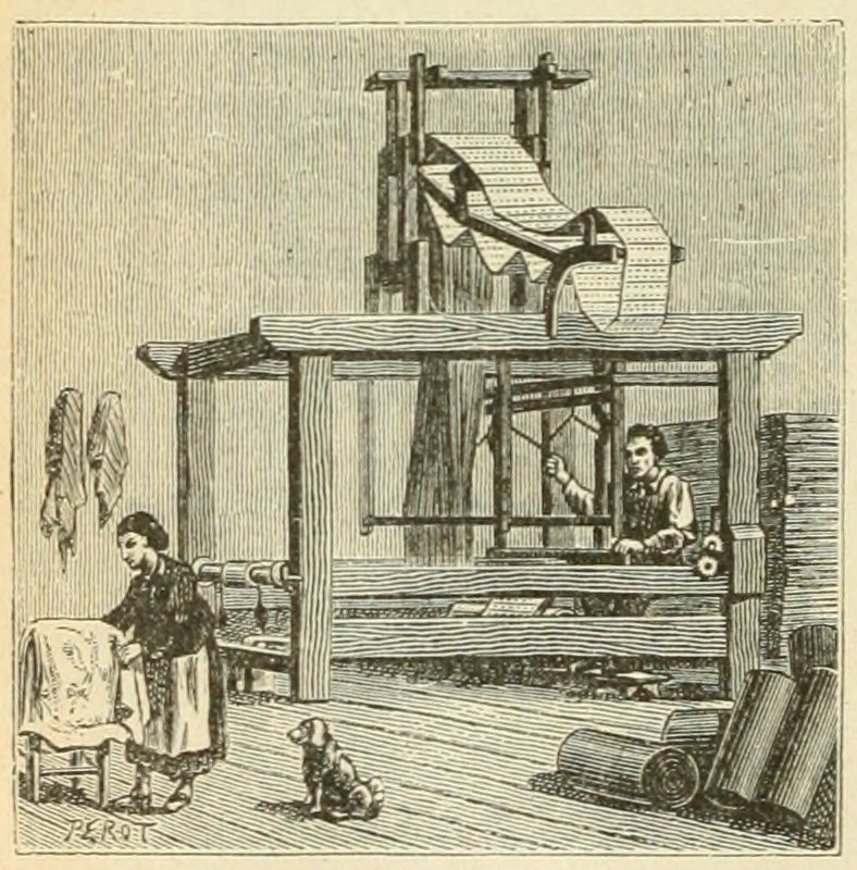 Illustration d'un métier à tisser Jacquart dans Le Tour de la France par deux enfants, par George Bruno, manuel scolaire, édition de 1904.